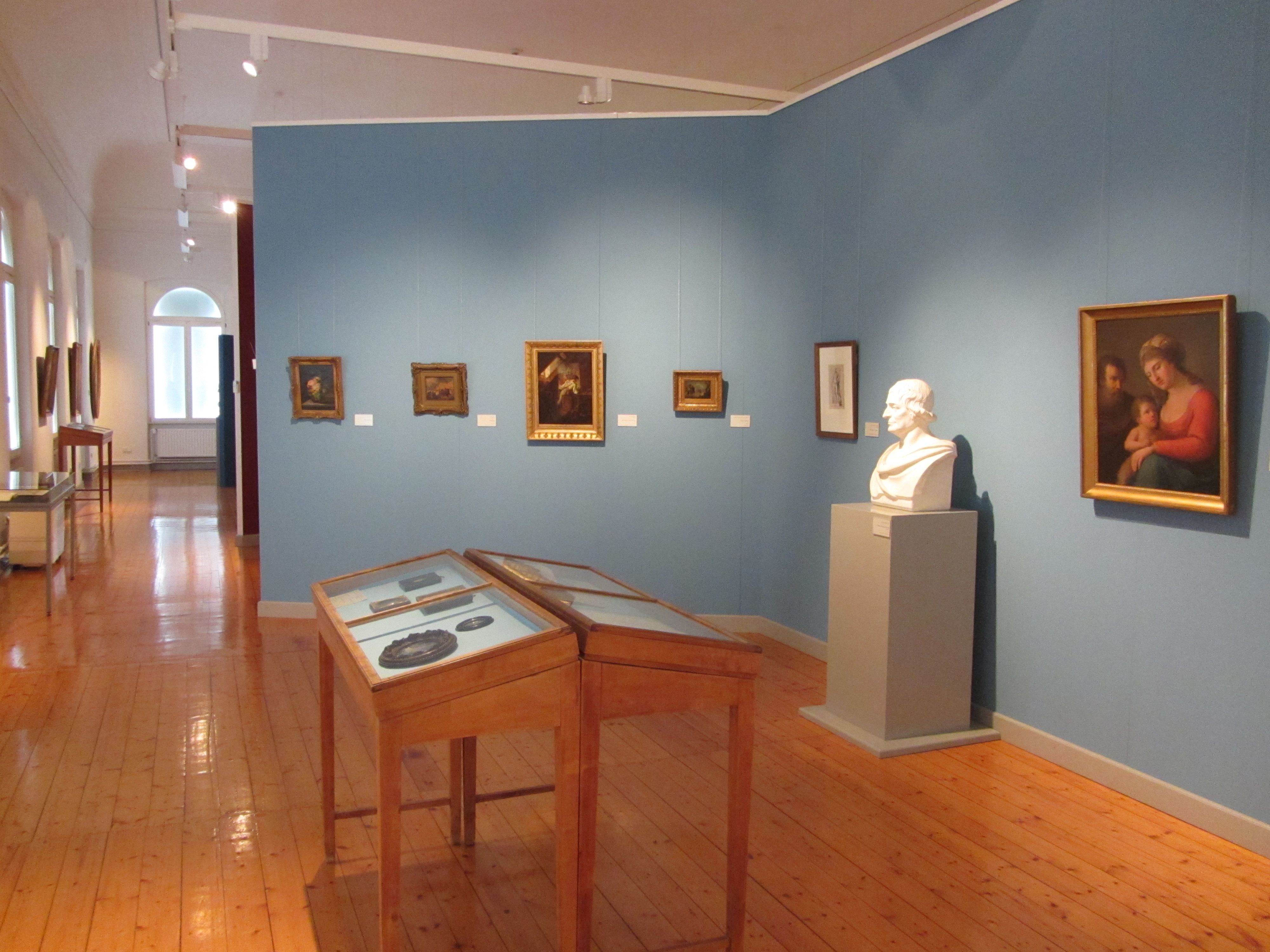 Kunstsammlung der Universität Göttingen: Blick in die Sammlungen.